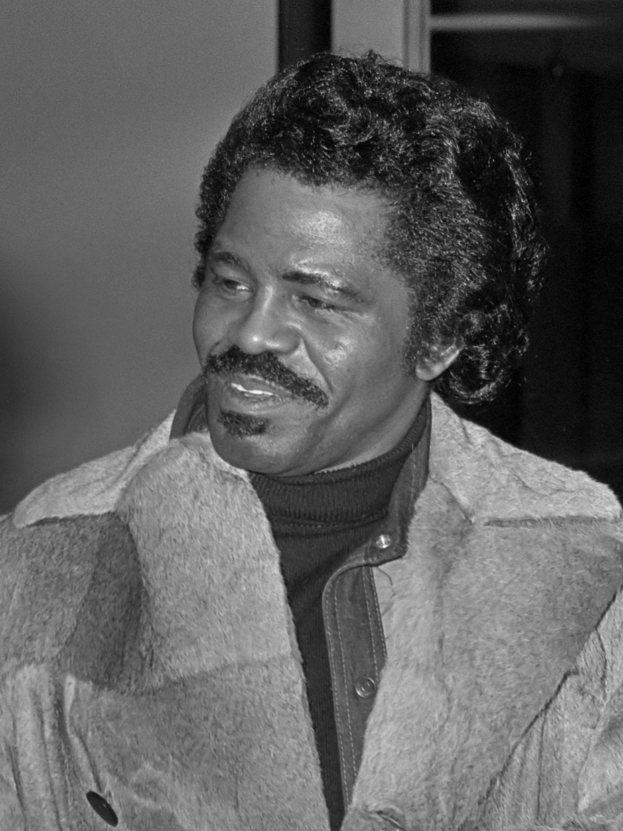 Aankomst zanger James Brown op Schiphol 12 januari 1977